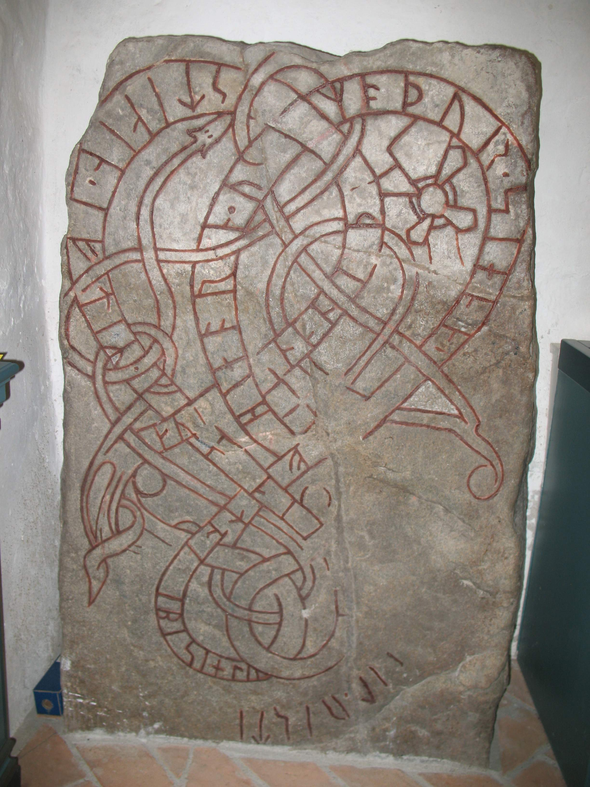 Runstenen U 334 i Orkesta kyrka.